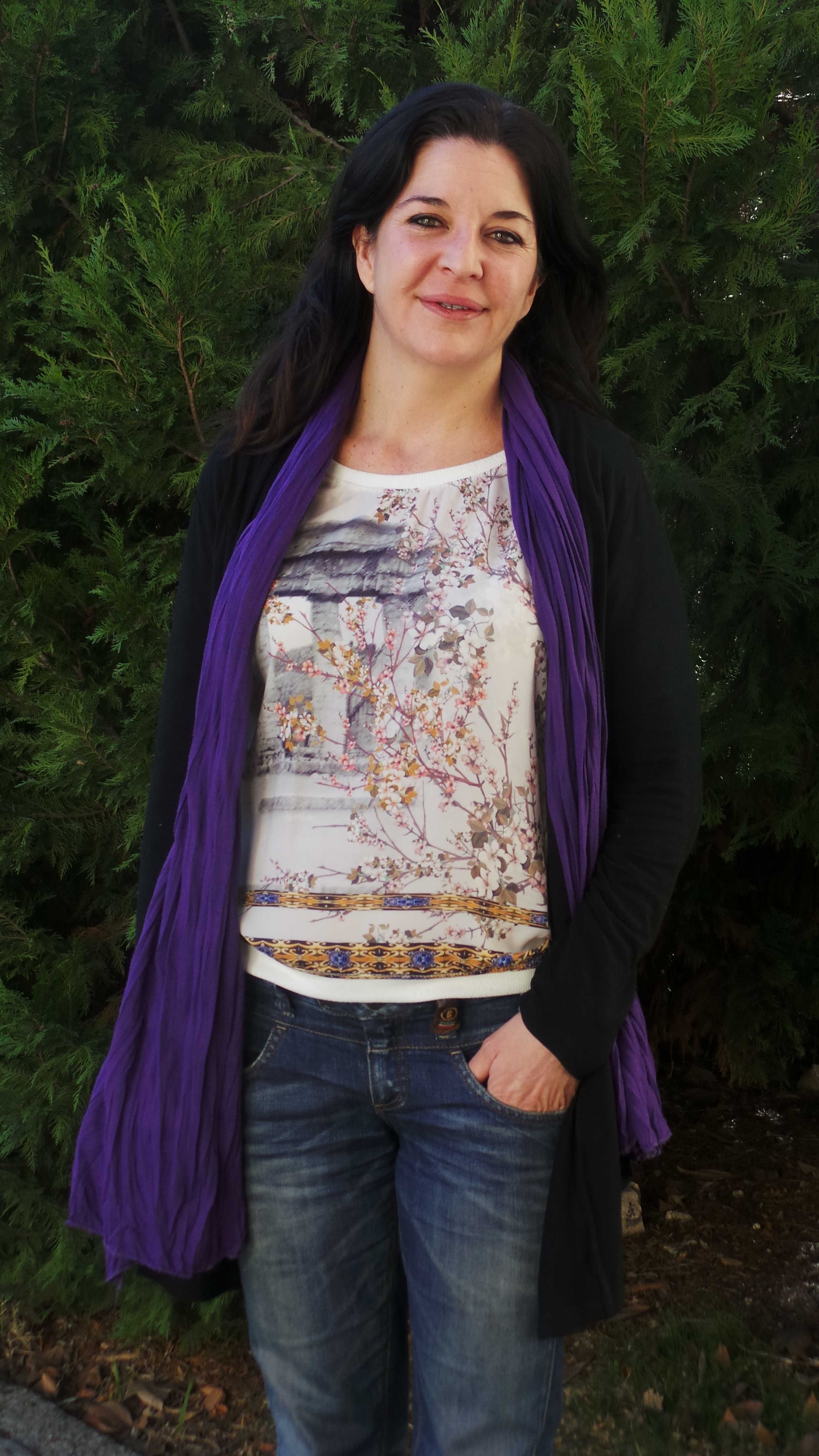 Directora de la Cátedra de Género de la Universidad Rey Juan Carlos de Madrid